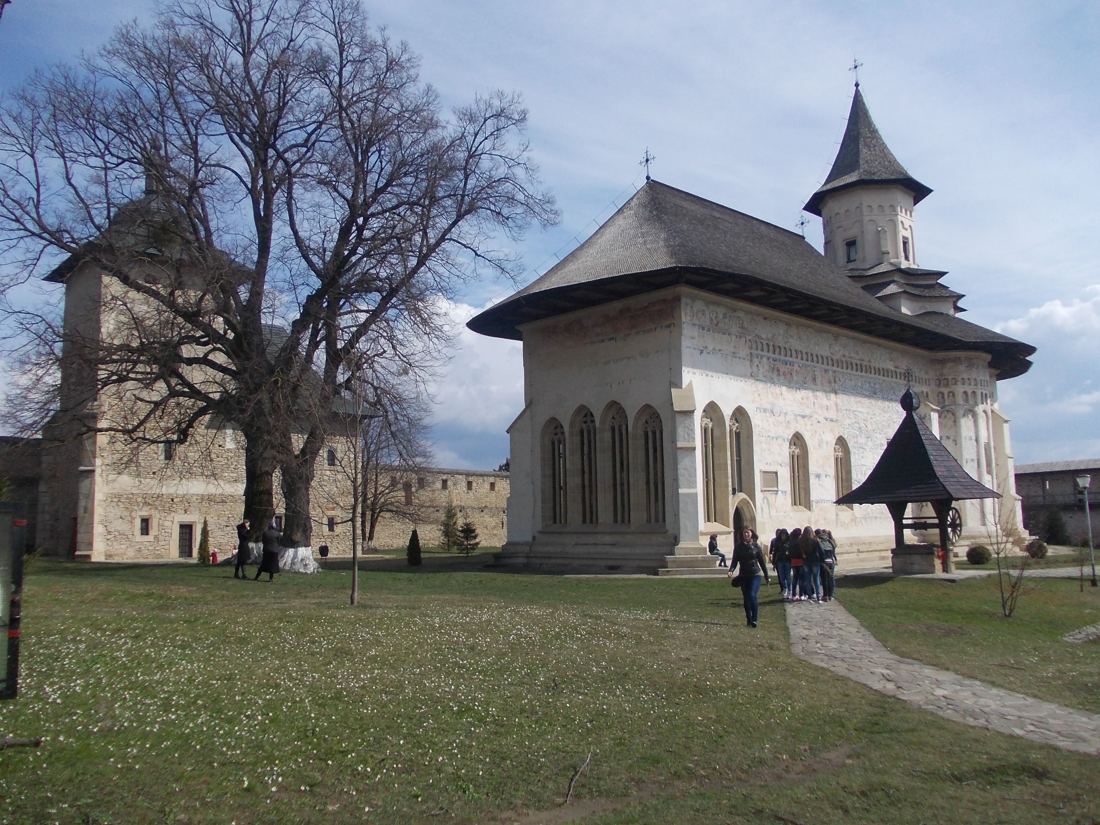 Imagine de ansamblu a curţii interioare a mânăstirii Probota